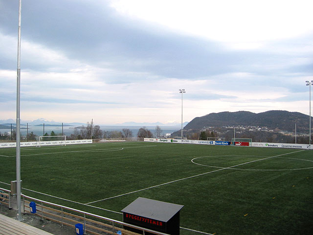 Landsåsbanen